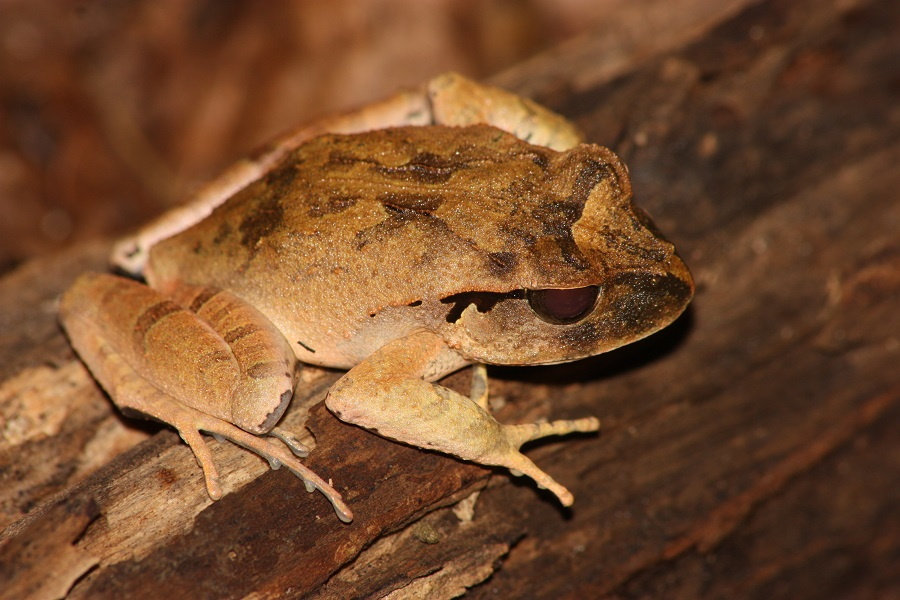 Lechriodus melanopyga in Porotona, Milne Bay, Papua New-Guinea